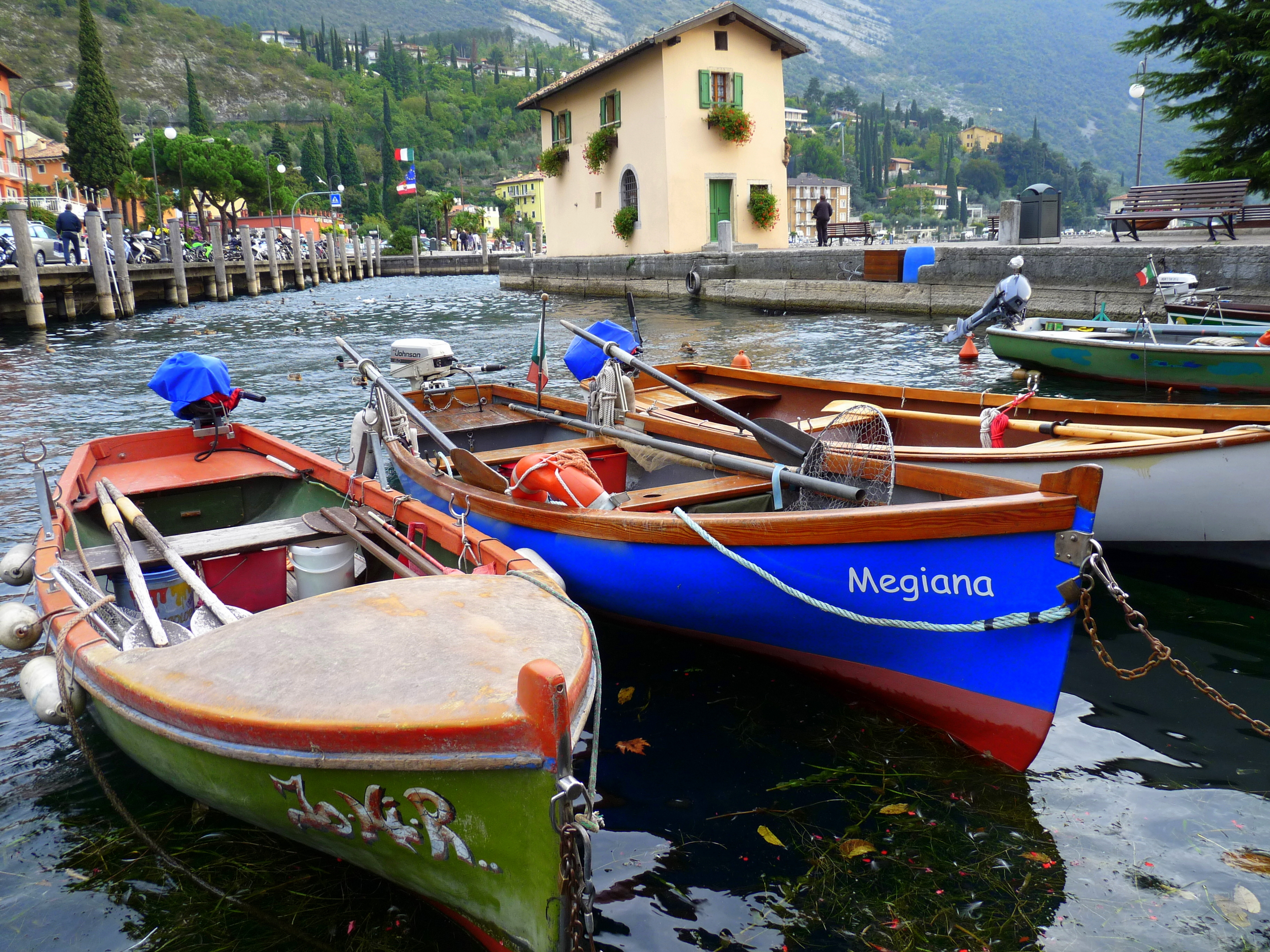 Lago Garda